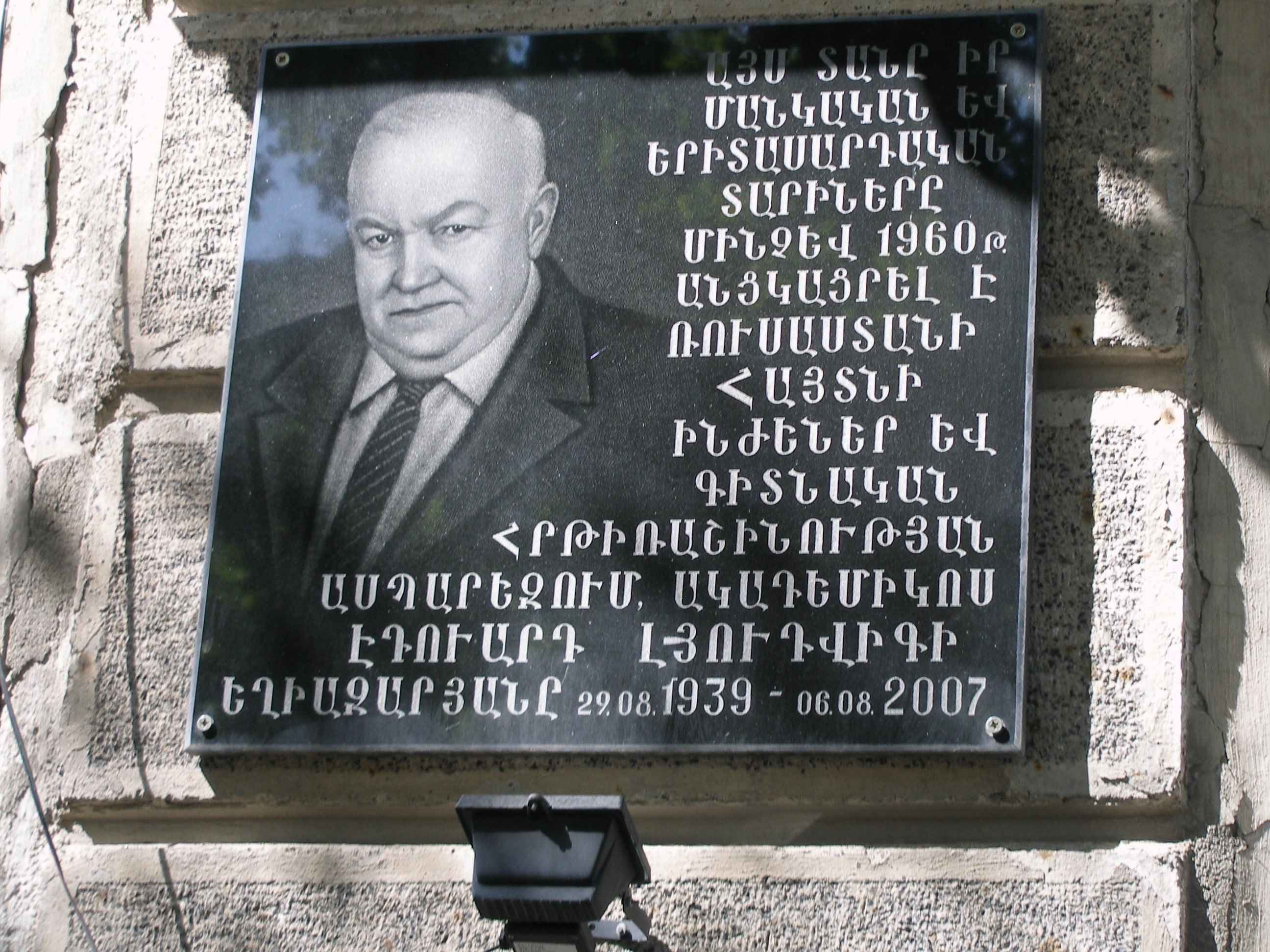 mine